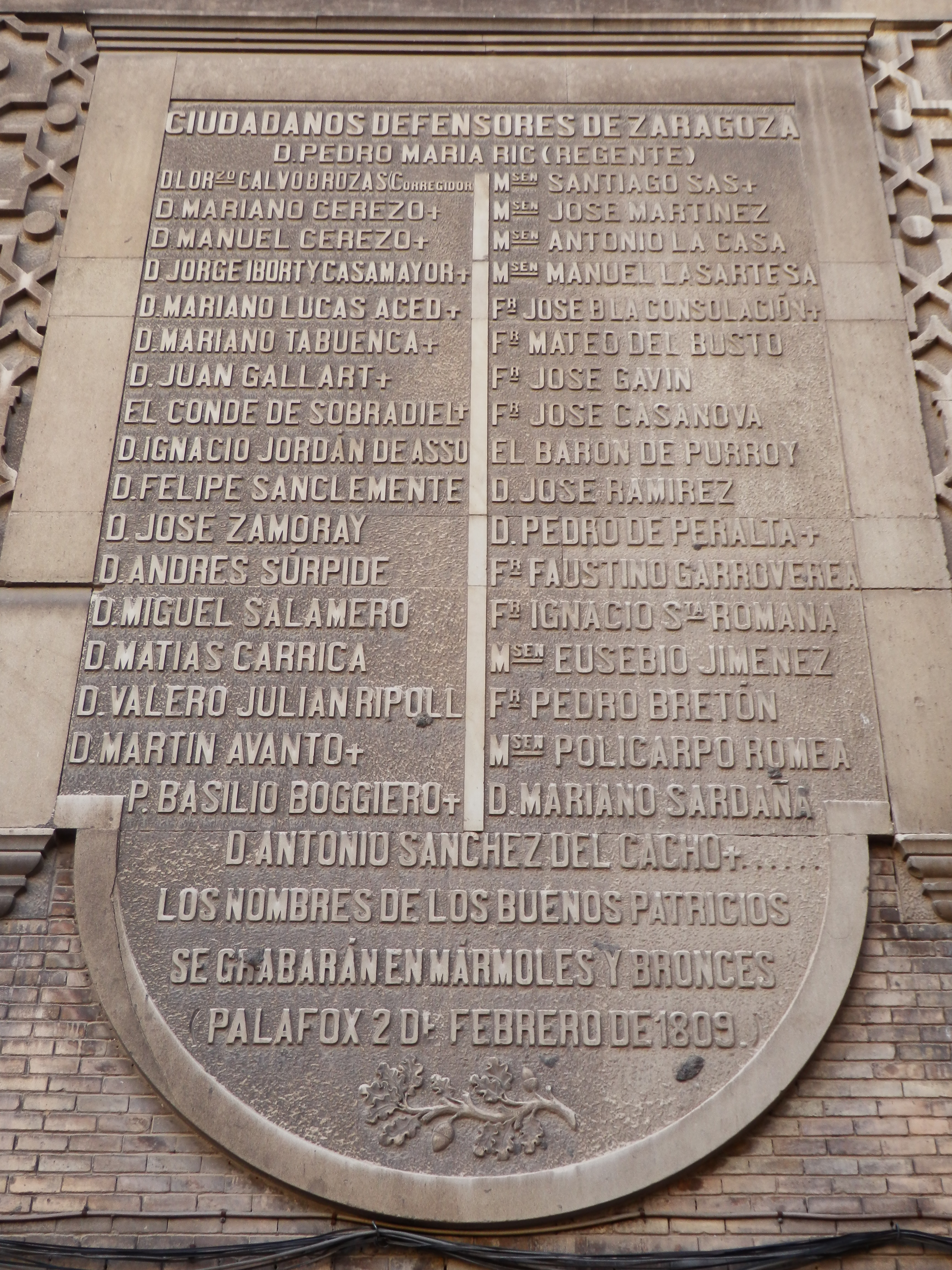 Antigua Escuela de Artes y Oficios de Zaragoza. Reconocimiento a los ciudadanos defensores de Zaragoza en los Sitios.